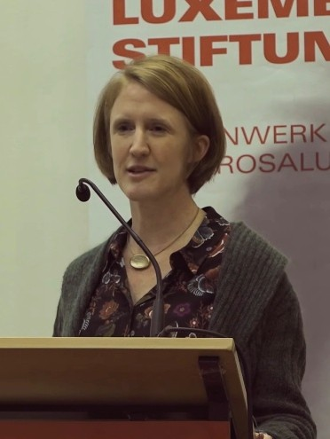 Zur falschen Entgegensetzung von Klassenfrage und Identitätspolitik - Vortrag von Silke van Dyk im Rahmen der Konferenz «Verbindende Bildung» am 8.2.2018 Weitere Infos